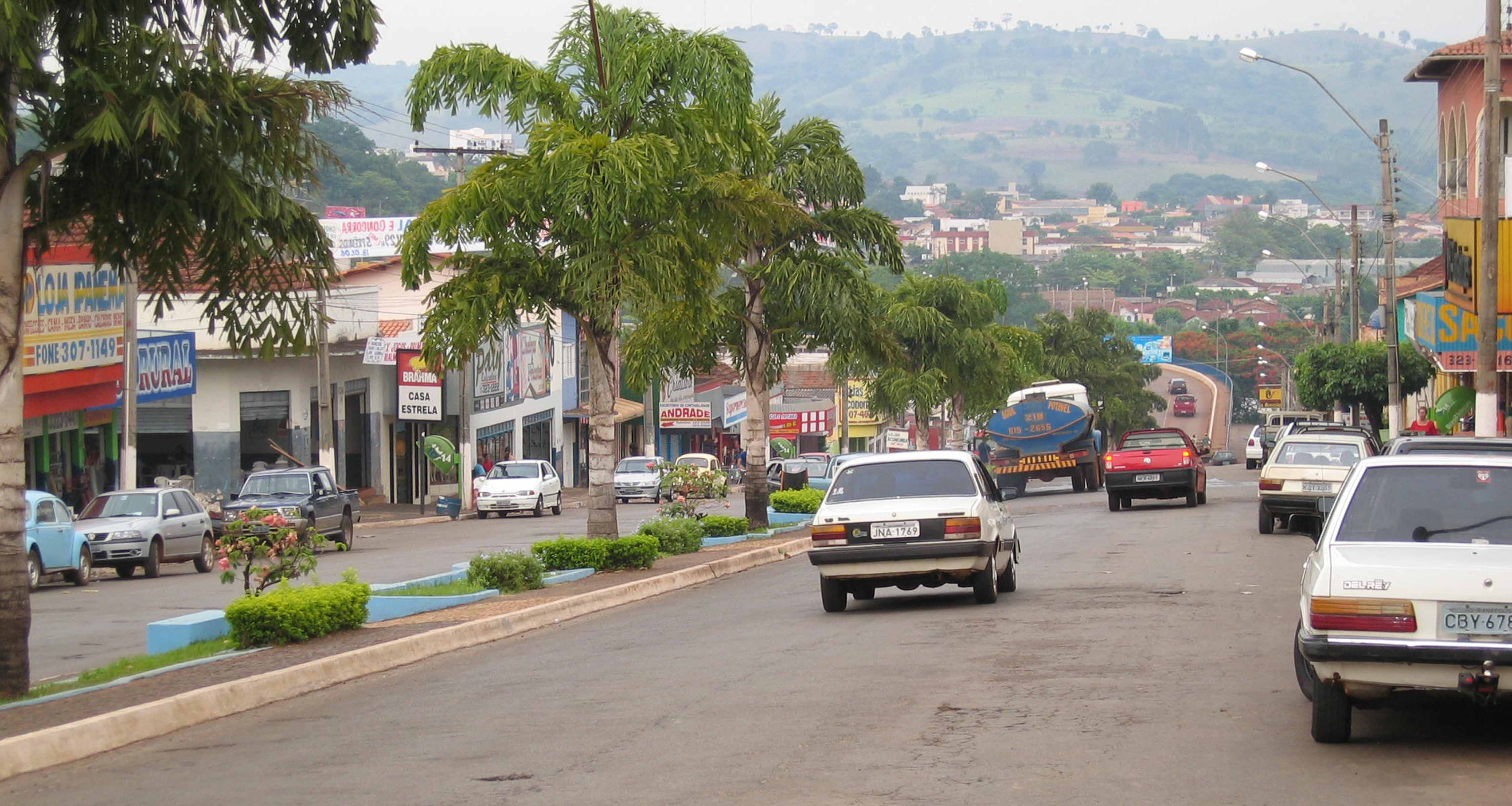 Avenida Bernardo Sayão em Rialma, estado do Goiás, Brasil.